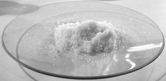 Ammonium carbonate (NH4)2CO3